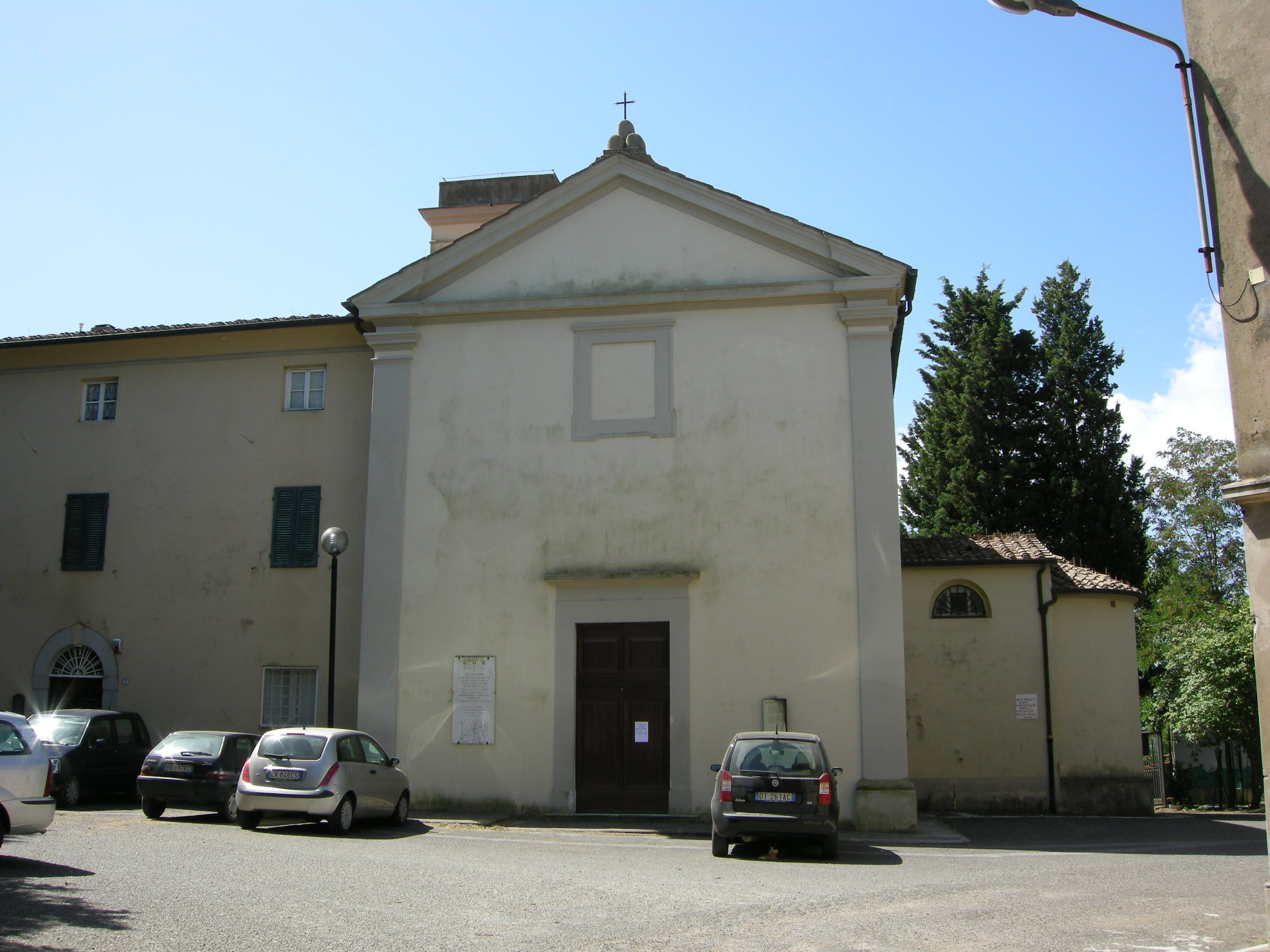 Chiesa di santa maria assunta e san lorenzo a castell'anselmo